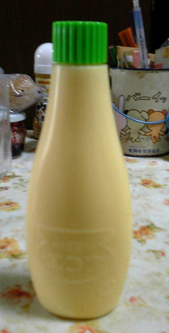 チューブ入りマヨネーズ